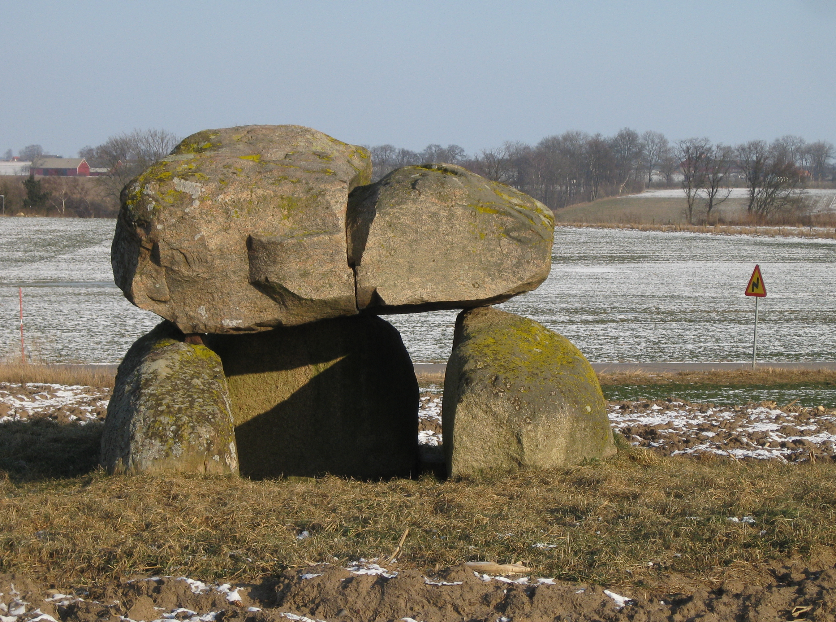 Gravdös söder om Gantofta i Skåne